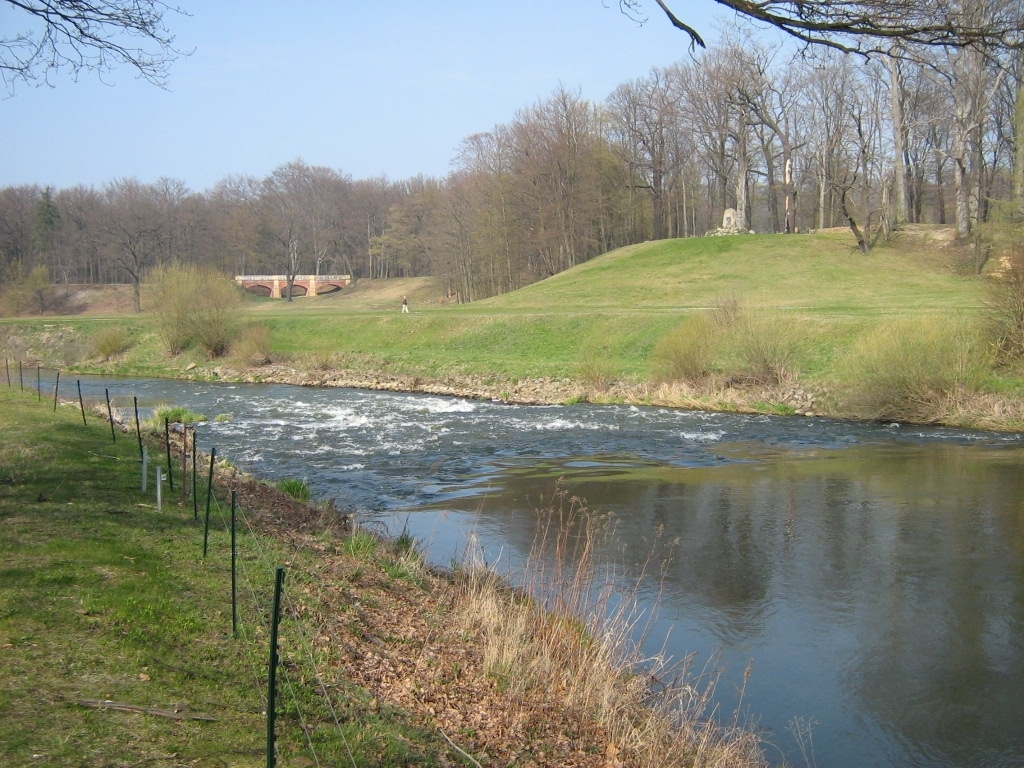 Die Lausitzer Neiße im Bereich des Landschaftsparks Bad Muskau - Bad Muskau (Niederschlesischer Oberlausitzkreis, Sachsen) und Łęknica (Województwo lubuskie, Polska)